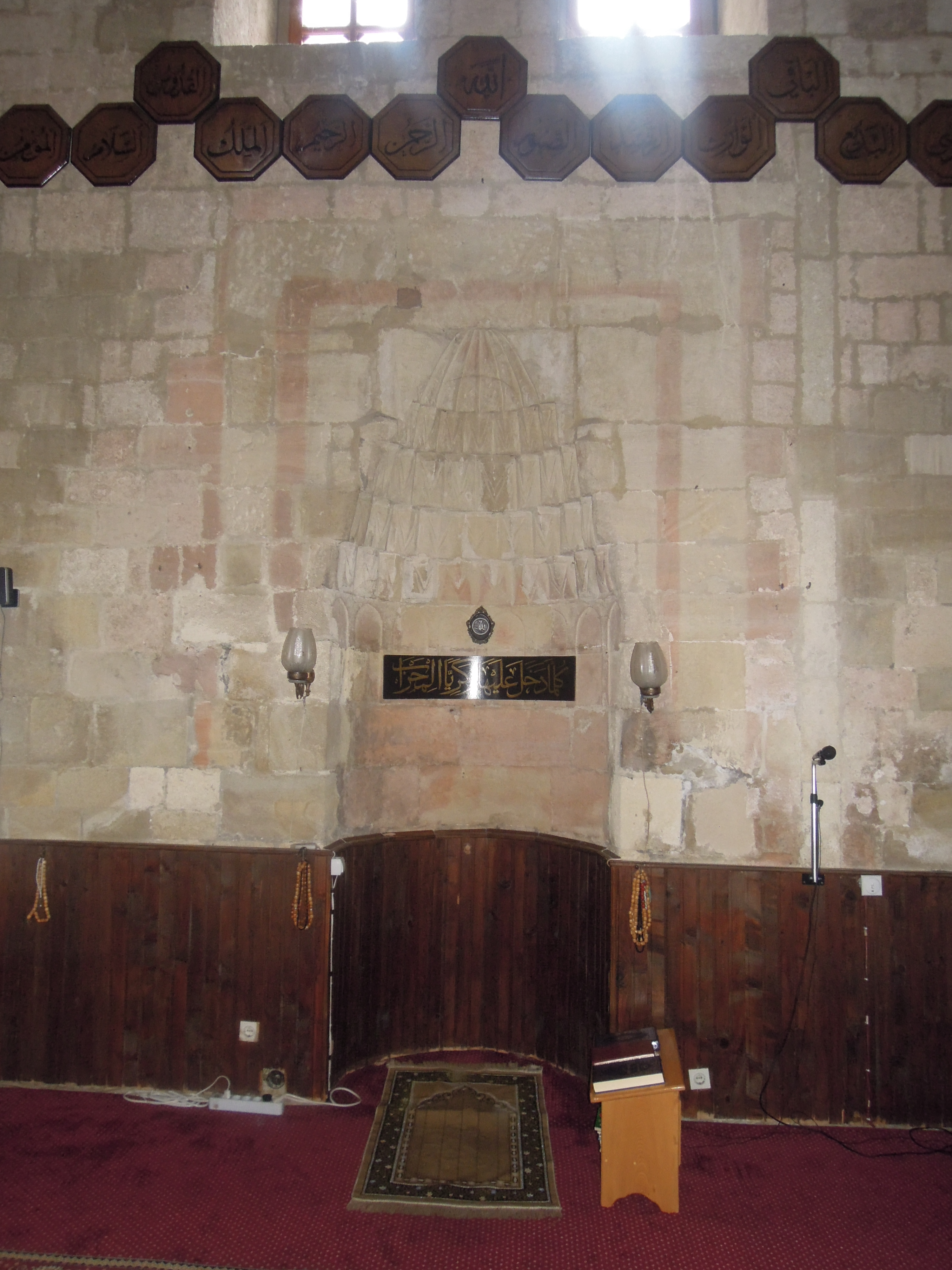 Бајракли џамија је саграђена око 1575. године, као једна од 273 џамија, колико их је у турско доба било у Београду.